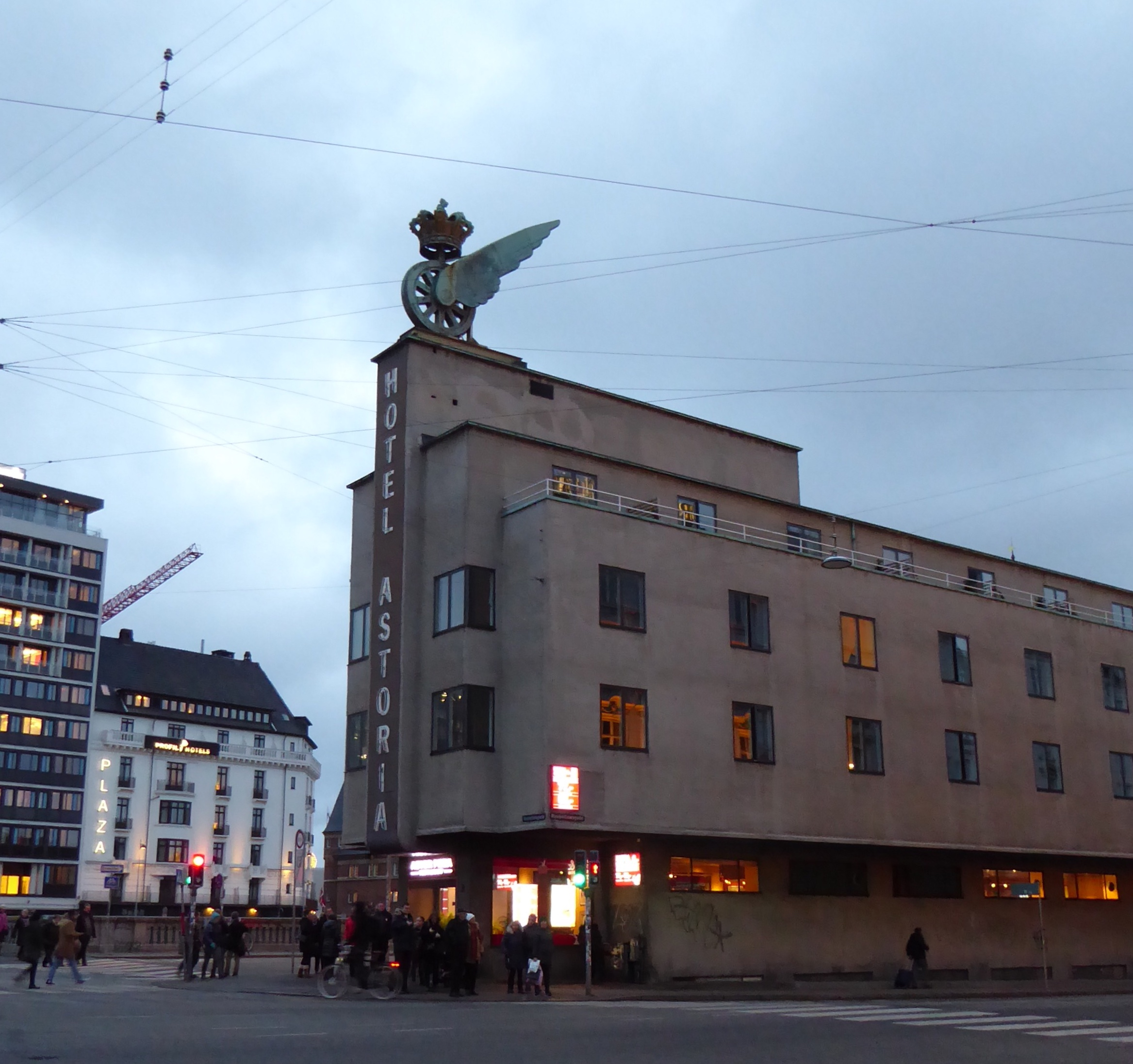 Hotel Astoria in Copenhagen, Denmark